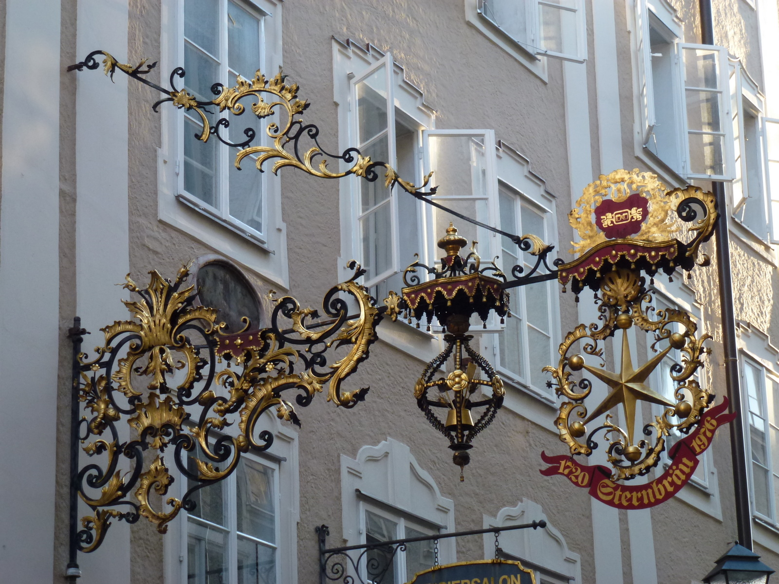 Zunftschild des Sternbräu, Getreidegasse, Salzburg